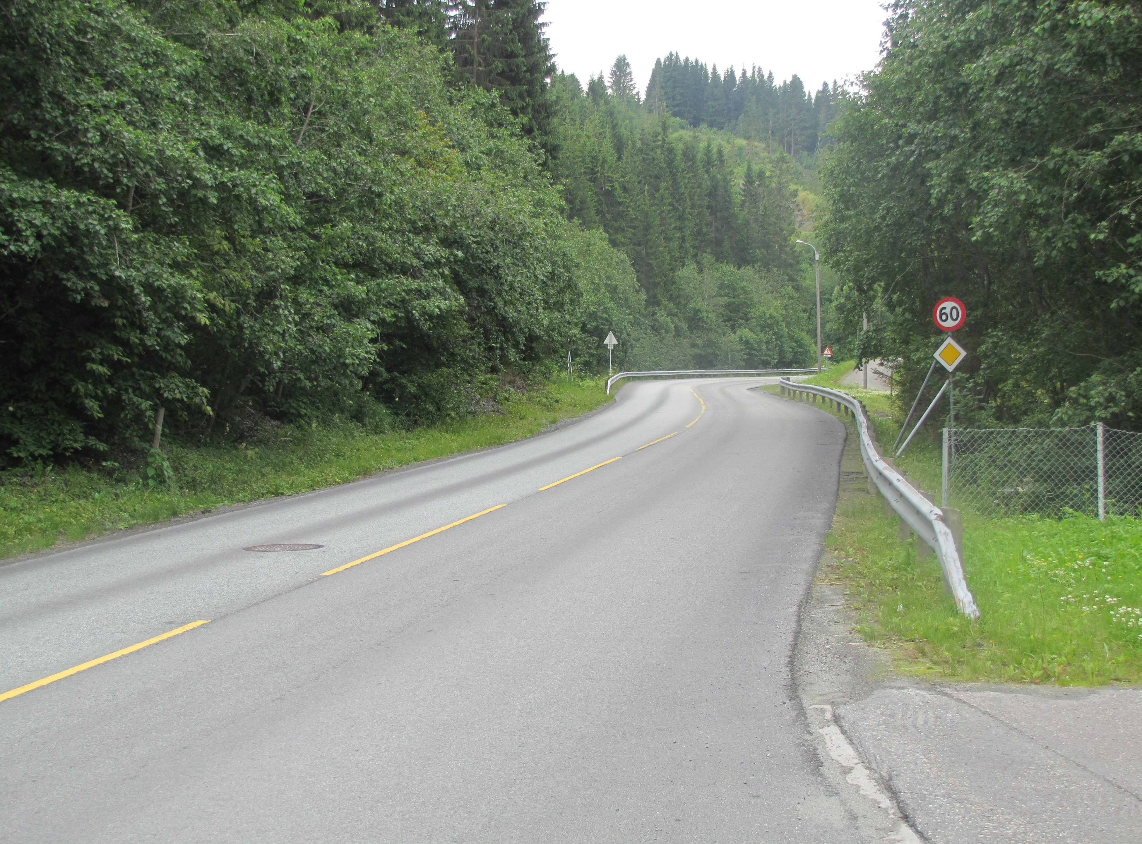 FV900 Bjørndalen, Trondheim